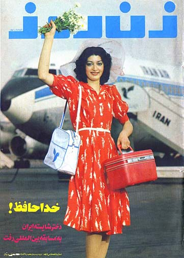 شهره نیک‌پور، برنده مسابقات دختر شایسته ایران در حال سفر به مسابقات ملکه زیبایی جهان. (زن روز ۲۰ مرداد ۱۳۵۴ / ۱۶ اوت ۱۹۷۵)